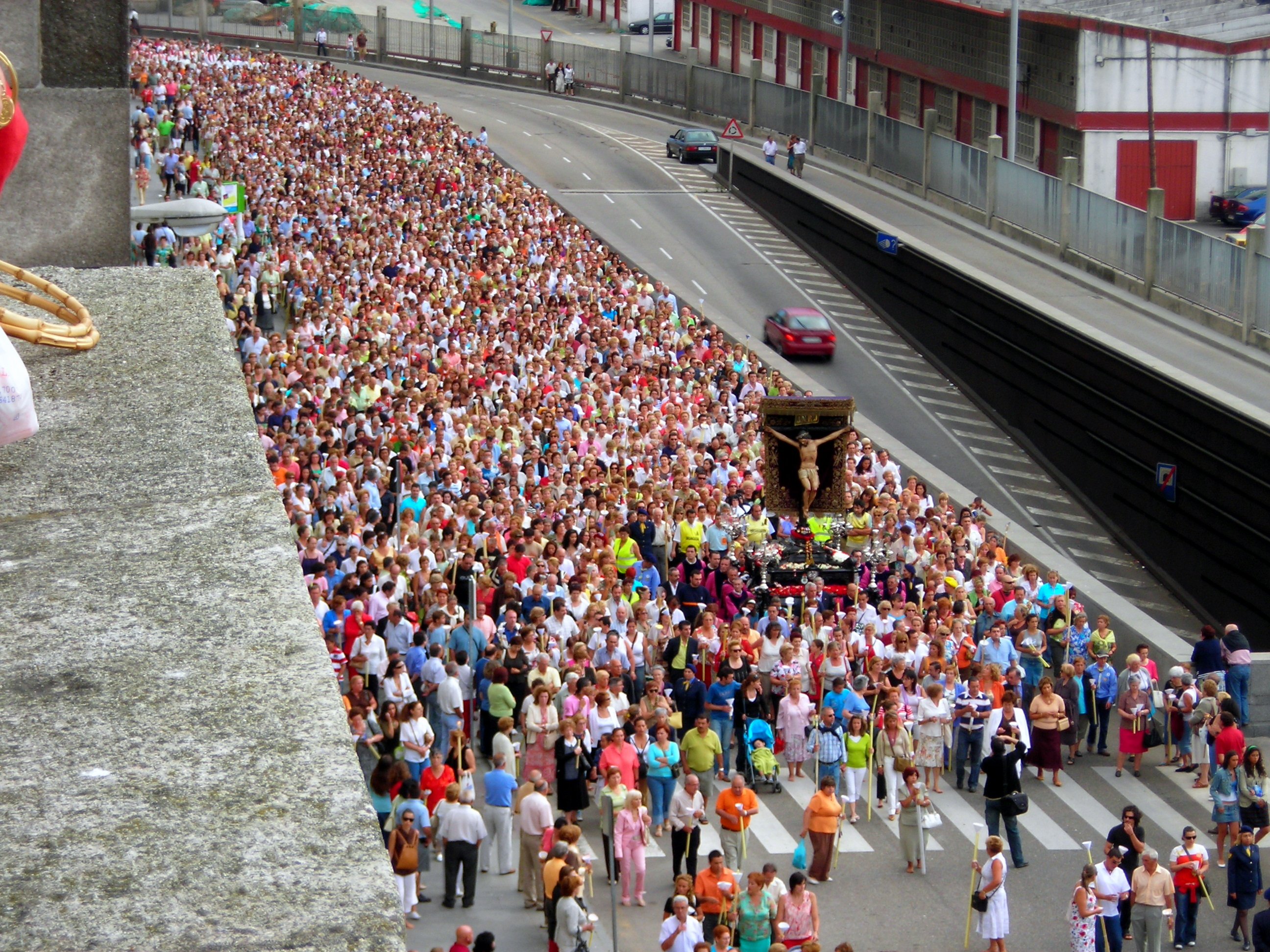 Procesión do Cristo da Vitoria, Vigo, Galicia (Spain)